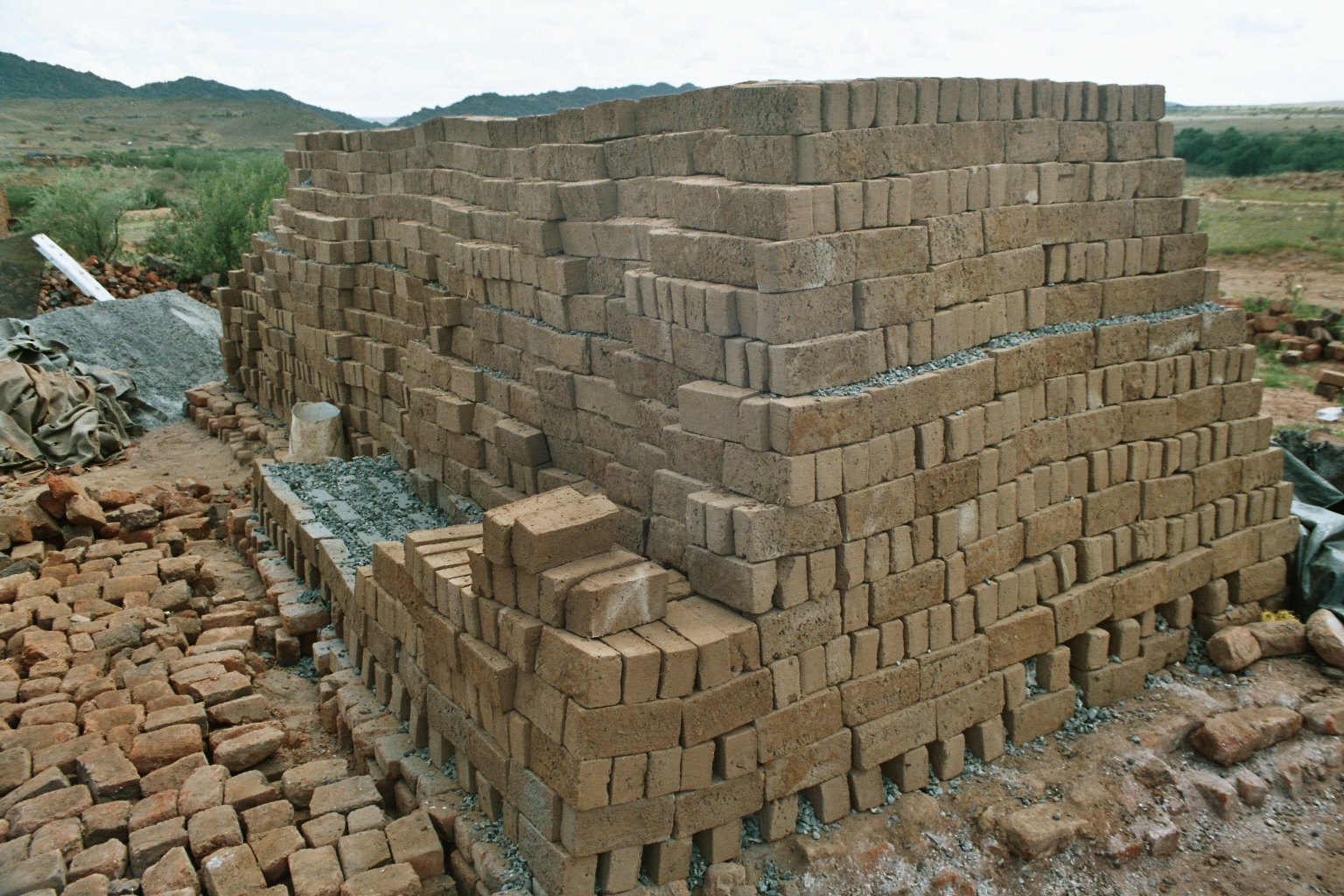 Herstellung von Handstrichziegeln in Dukatole (Maletswai, Südafrika) – Ziegelmeiler kurz vor der Fertigstellung. Die getrockneten Ziegelformen werden in einem Meiler aufgeschichtet. Zwischen den Ziegeln wird Kohle (im Bild grau) hinzugefügt. Der Meiler wird abschließen mit Lehm und Ziegeln minderer Qualität abgedeckt. Nach ca. 14 Tagen ist der Brennvorgang abgeschlossen.